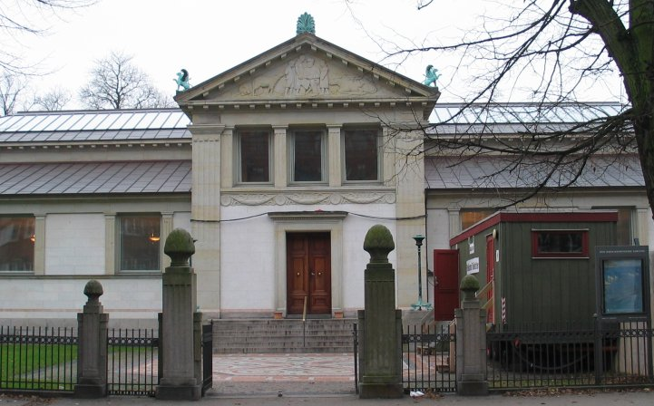 Den Hirschsprungske Samling. Museet er under restaurering i 2004, derfor ses en skurvogn foran hovedindgangen fra Stockholmsgade.